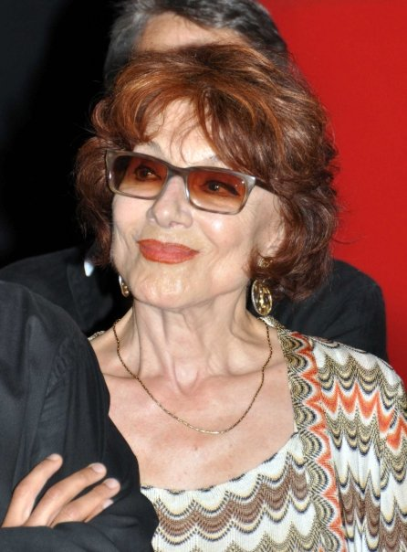 Judith Magre, actrice française